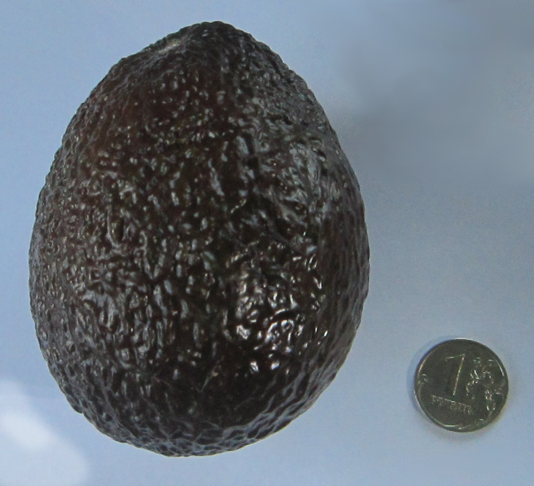 Спелый плод авокадо, целый, с масштабом